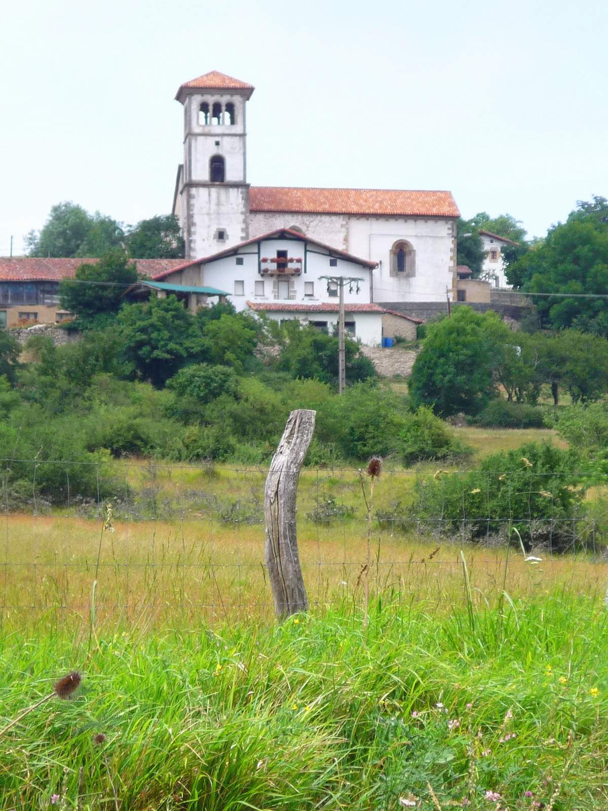 Iglesia de San Pedro (Beluntza, Urkabustaiz, Álava)